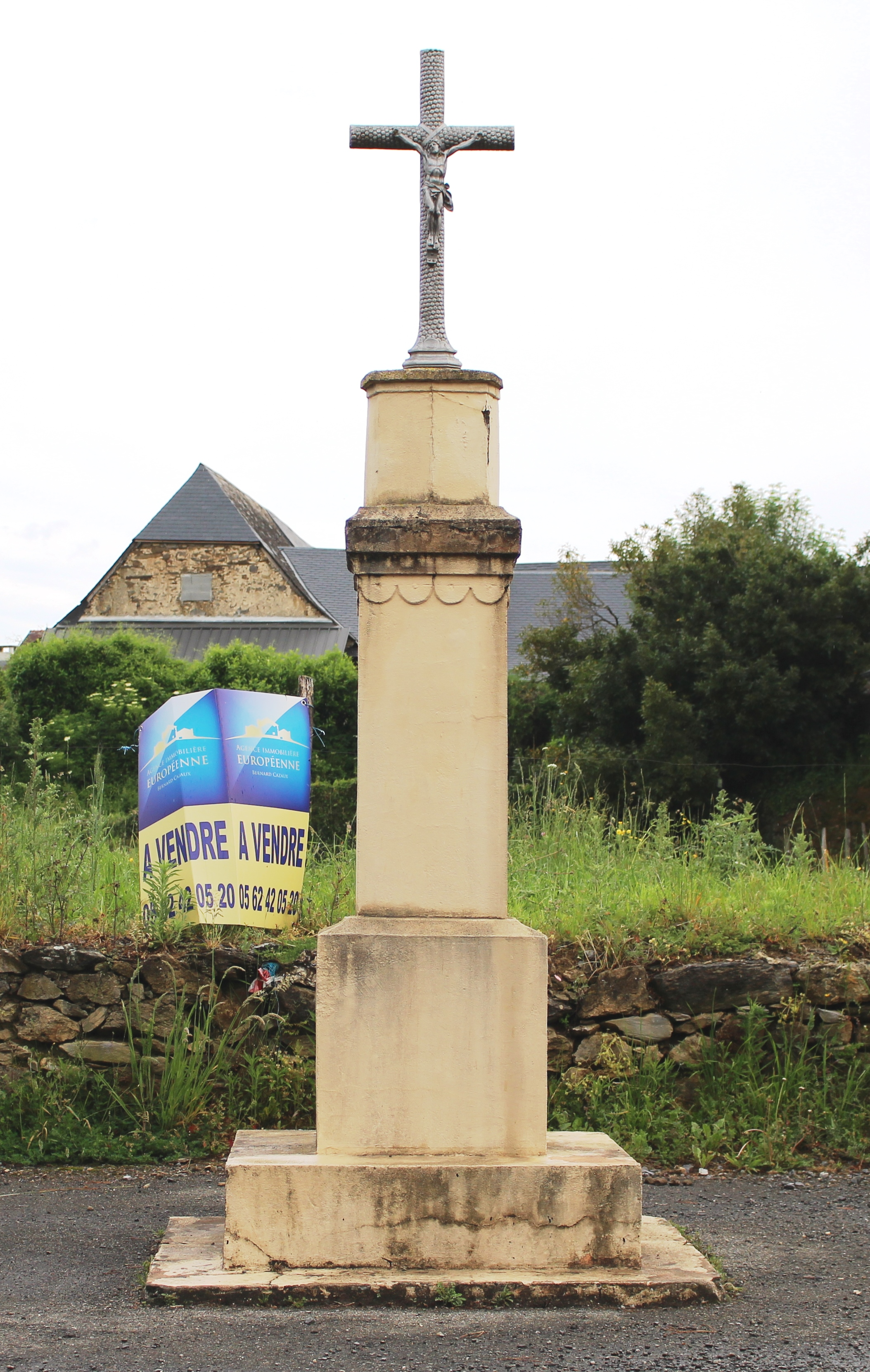 Croix de Gez-ez-Angles (Hautes-Pyrénées)